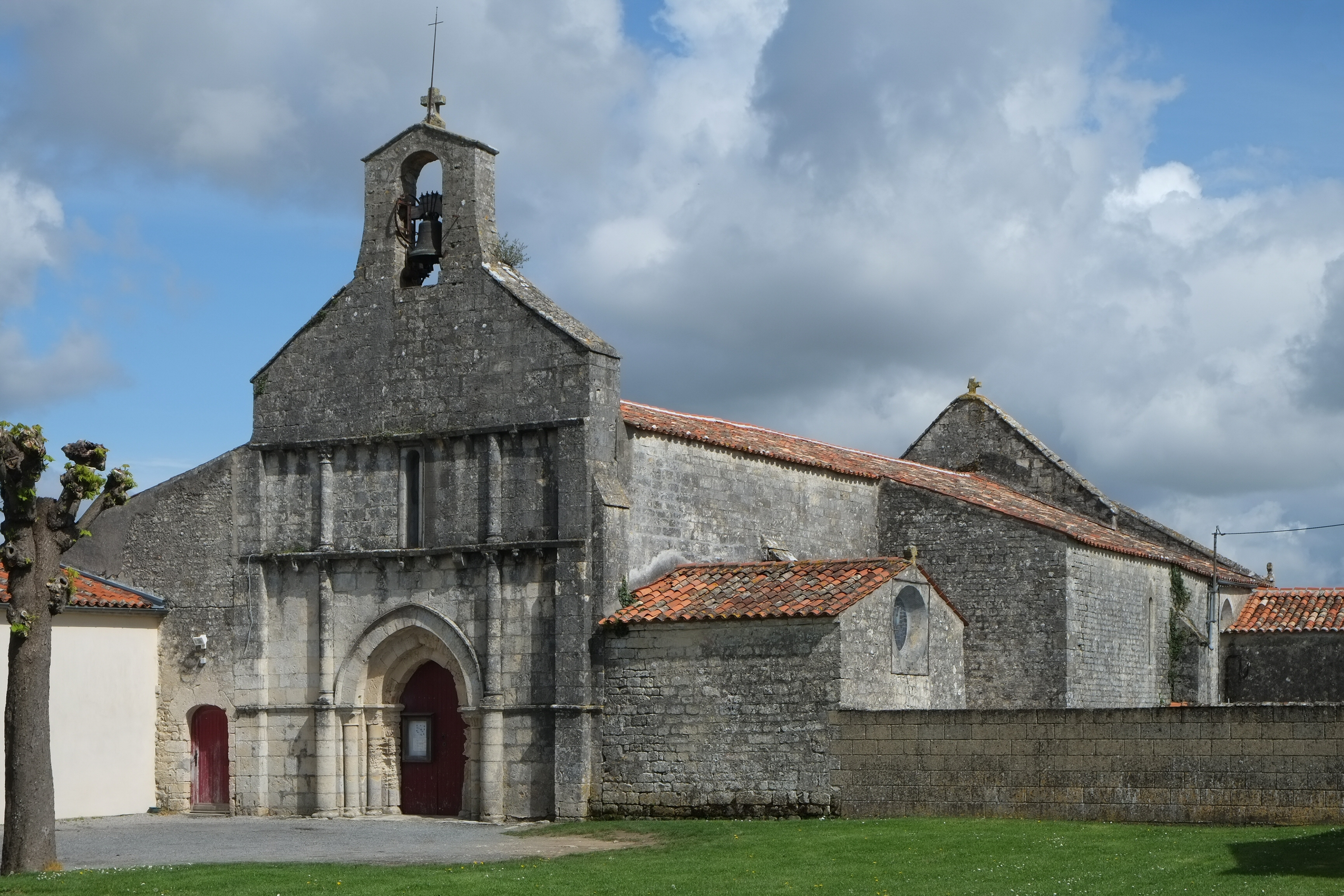 Église Saint-Laurent Forges Charente-Maritime France .